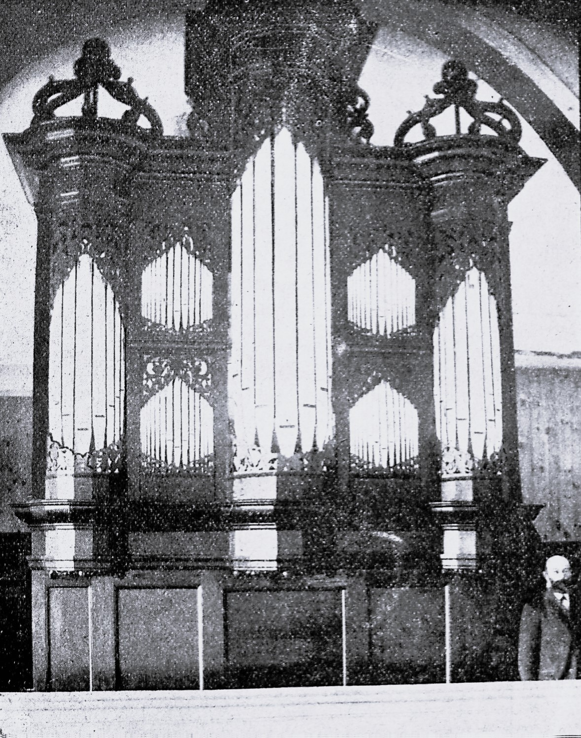 Die neue Orgel in der Kirche zu Genin. Erbaut 1905 von Kempper & Sohn Lübeck.